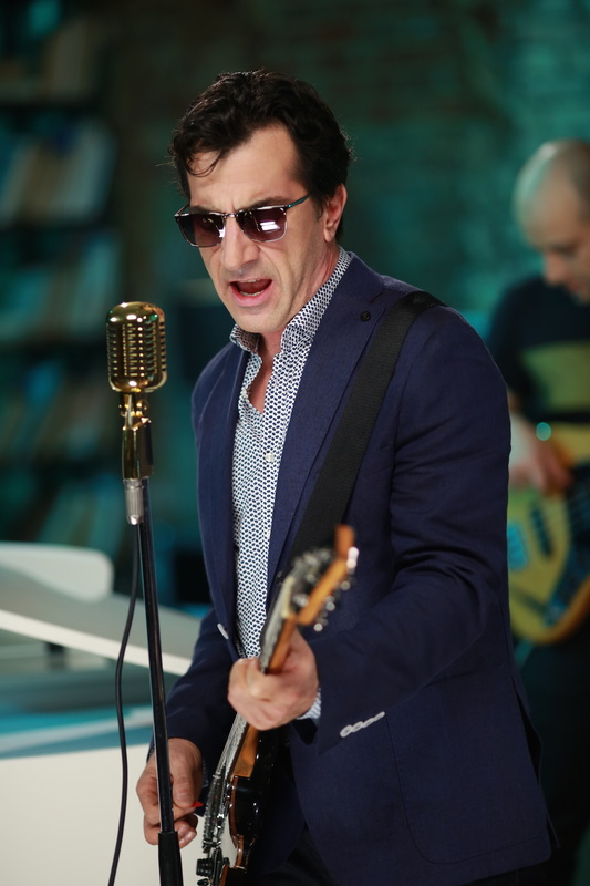 Güleryüz, 2015